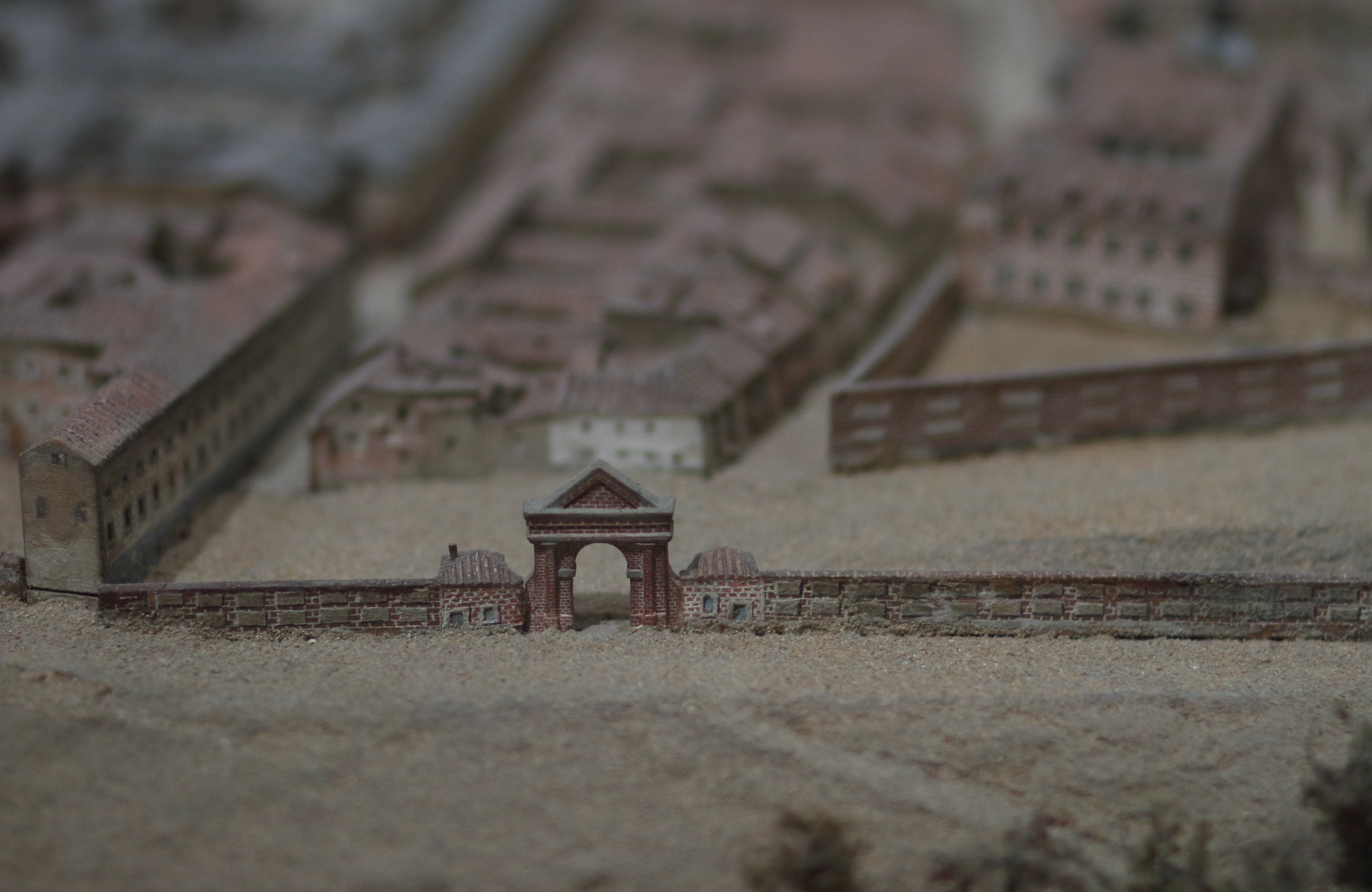 Representación del Portillo de Gil Imón en la Maqueta Histórica de Madrid de 1830 realizada por León Gil de Palacio, Museo de Historia de Madrid, Ayuntamiento de Madrid.